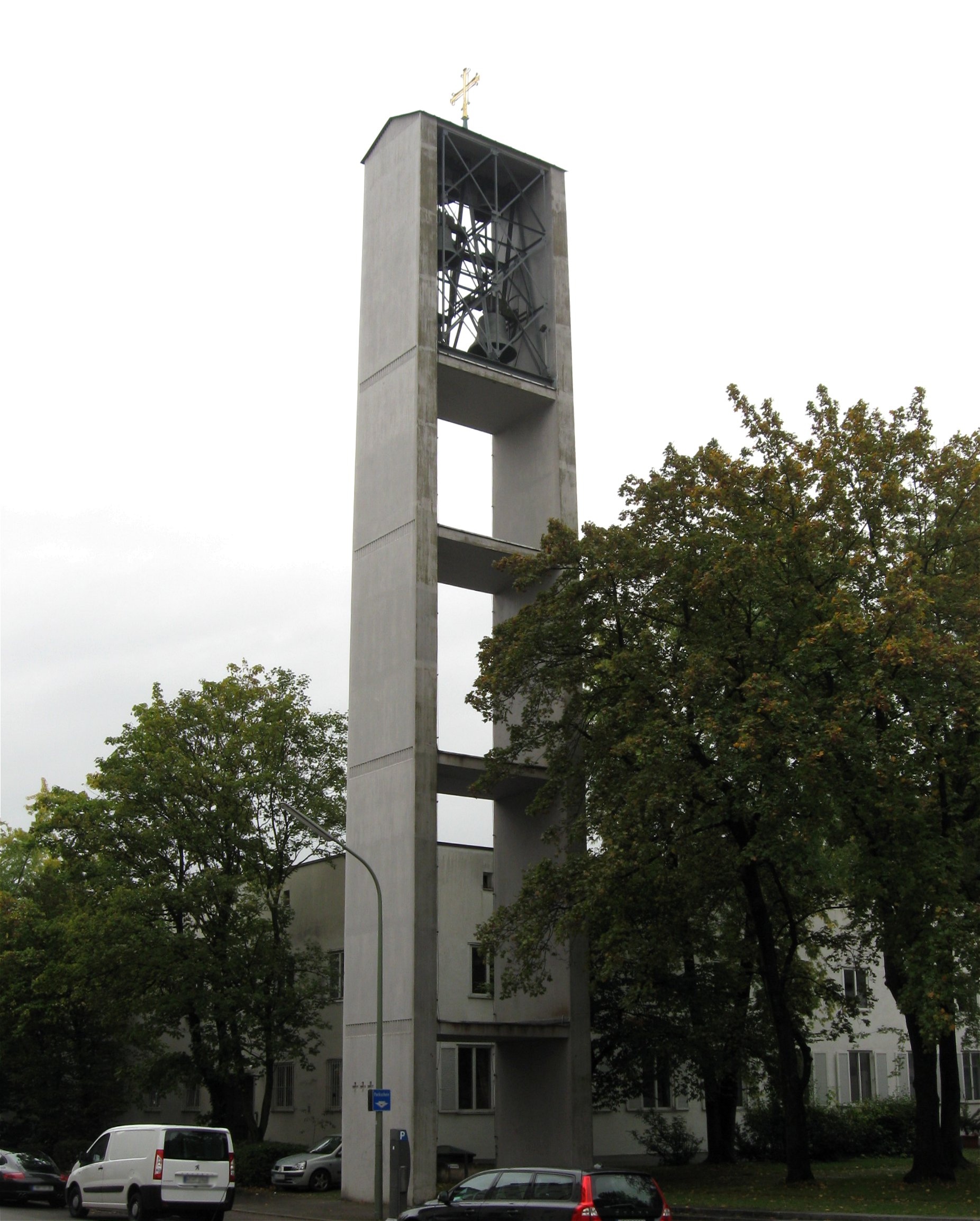 Hörwarthstraße 1; Kath. Pfarrkirche und Kirche des Konvents der Augustiner- Eremiten Maria vom Guten Rat; hoher, schlichter Sichtziegelbau mit Satteldach, durch Freiraum von der Straße abgerückt und mit am Gehsteig errichtetem Glockenständer; Nordfassade mit Betonrosette und Außenkanzel; betont nüchterner Sakralbau, der alle konstruktiven Elemente sichtbar zeigt; im Inneren weite Längshalle; die durch Stahlbeton-Stützen ausgesteiften Längswände, mit verschlämmten Ziegeln ausgefacht, tragen die Hängekonstruktion des offenen Holzdachstuhls; 1956/57 von Josef Wiedemann; mit Ausstattung.